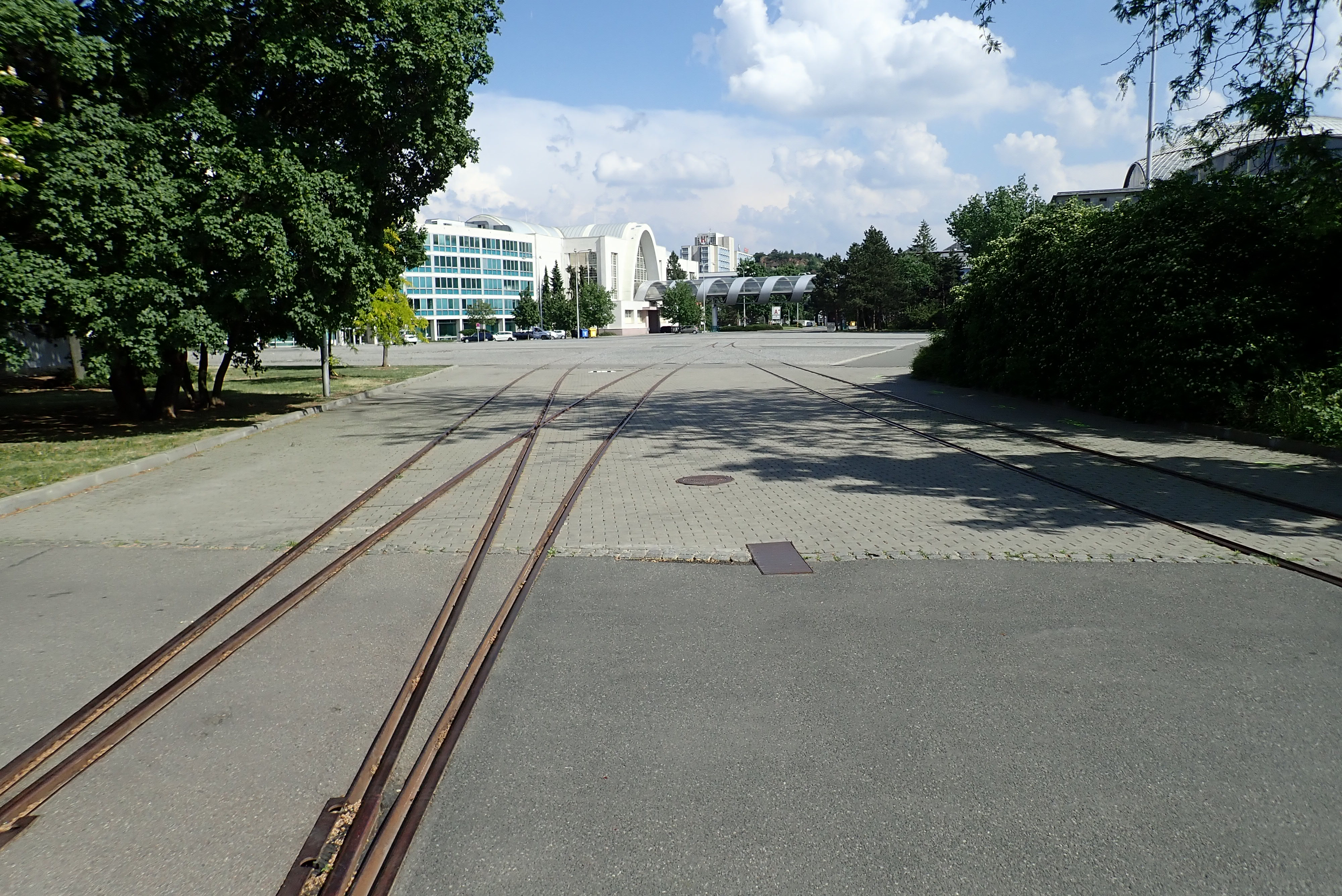 Pohled od zakončení střední a levé koleje zpět k pavilonu A